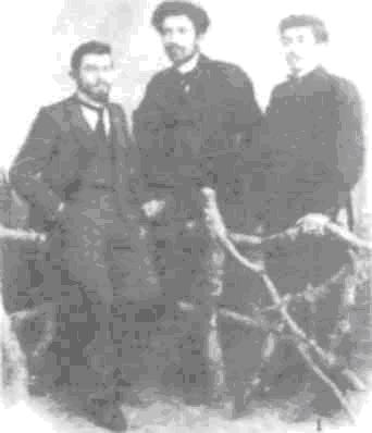 Димитър Общински.